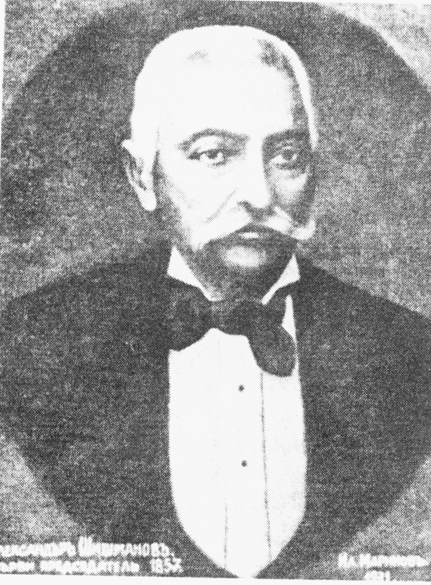 Портрет на Александър Шишманов.